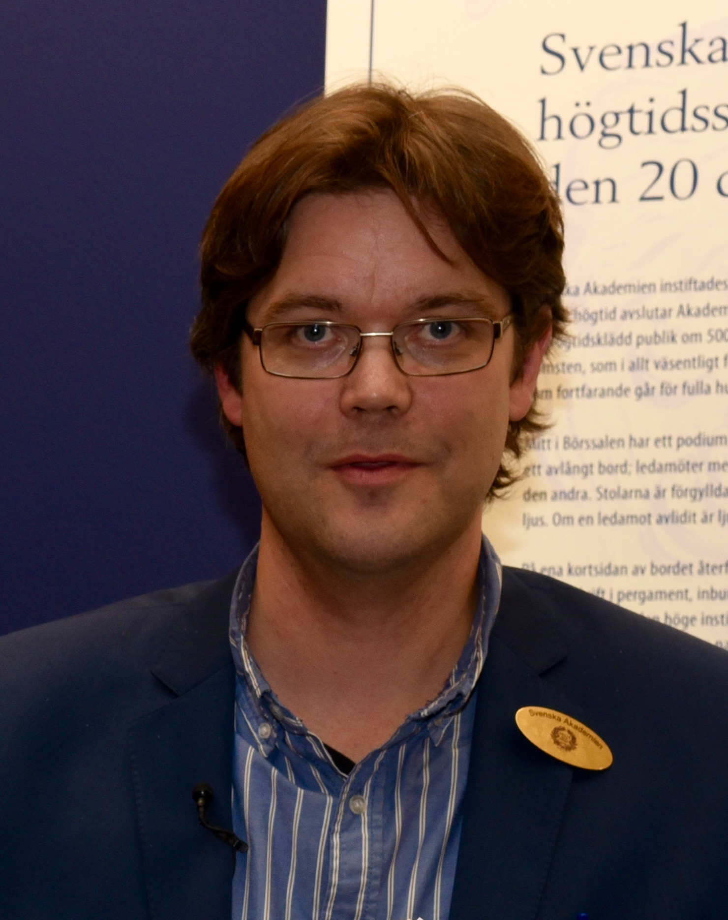 Kristian Fredén, bibliotekarie vid Nobelbiblioteket.